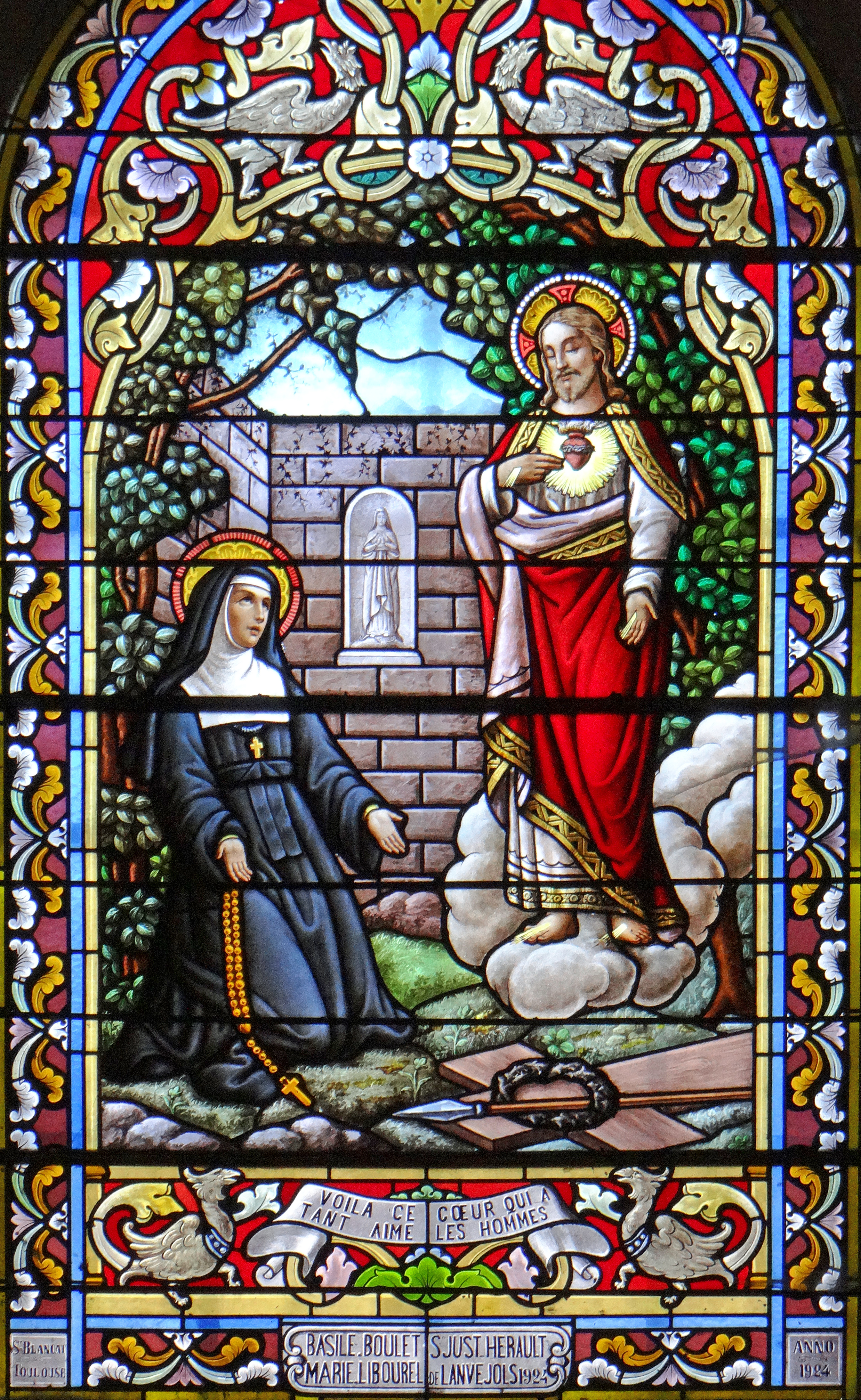 Lanuéjols - Église Saint-Laurent - Vitrail du Sacré Coeur de Jésus (1924)